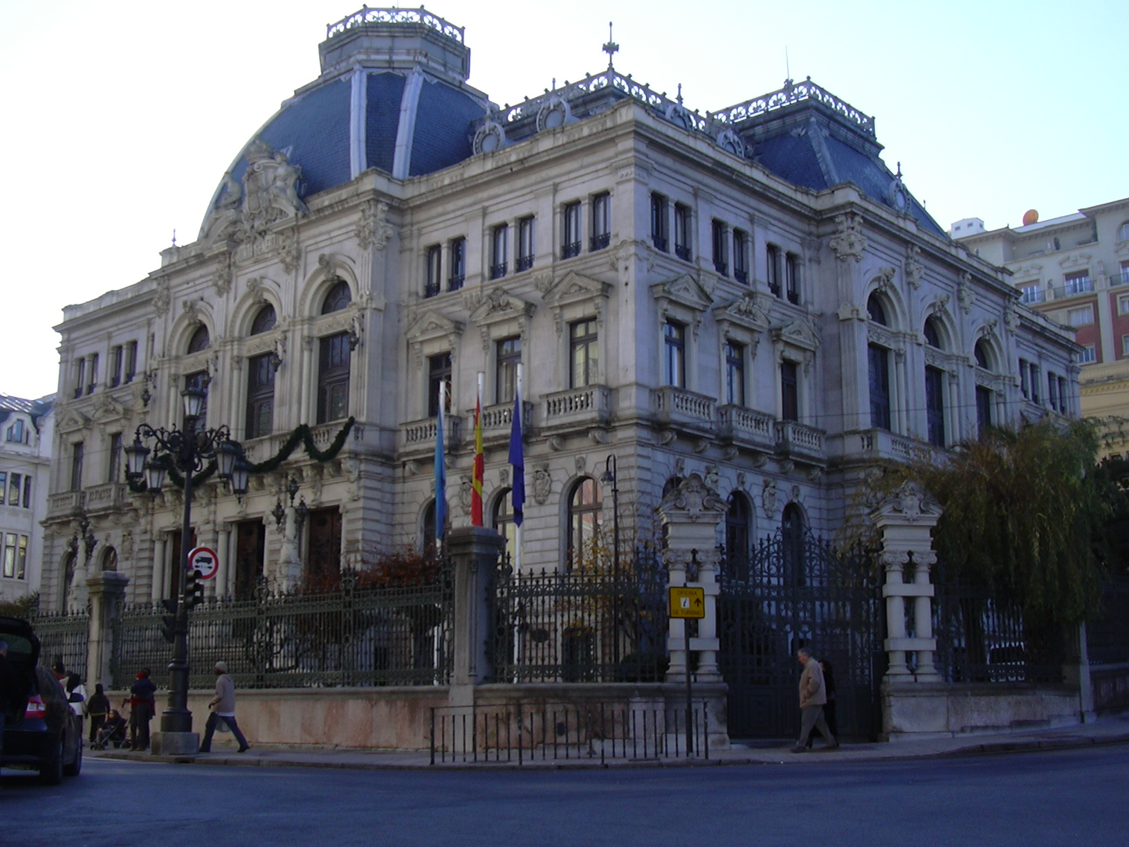 Edifício da Junta de Governo do Principado de Astúrias em Oviedo